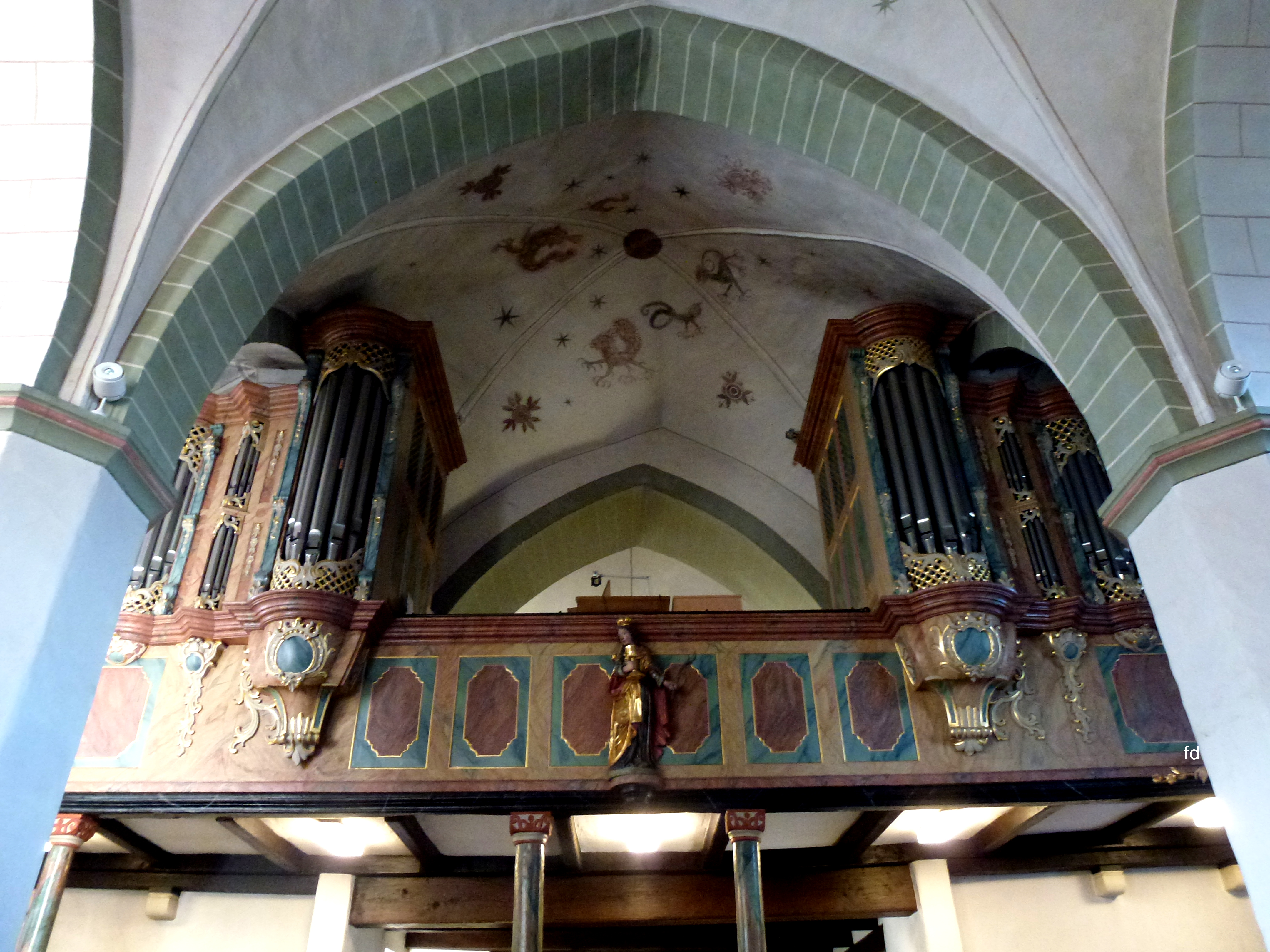 St.Johannes Evangelist Eversberg Orgel von 1648